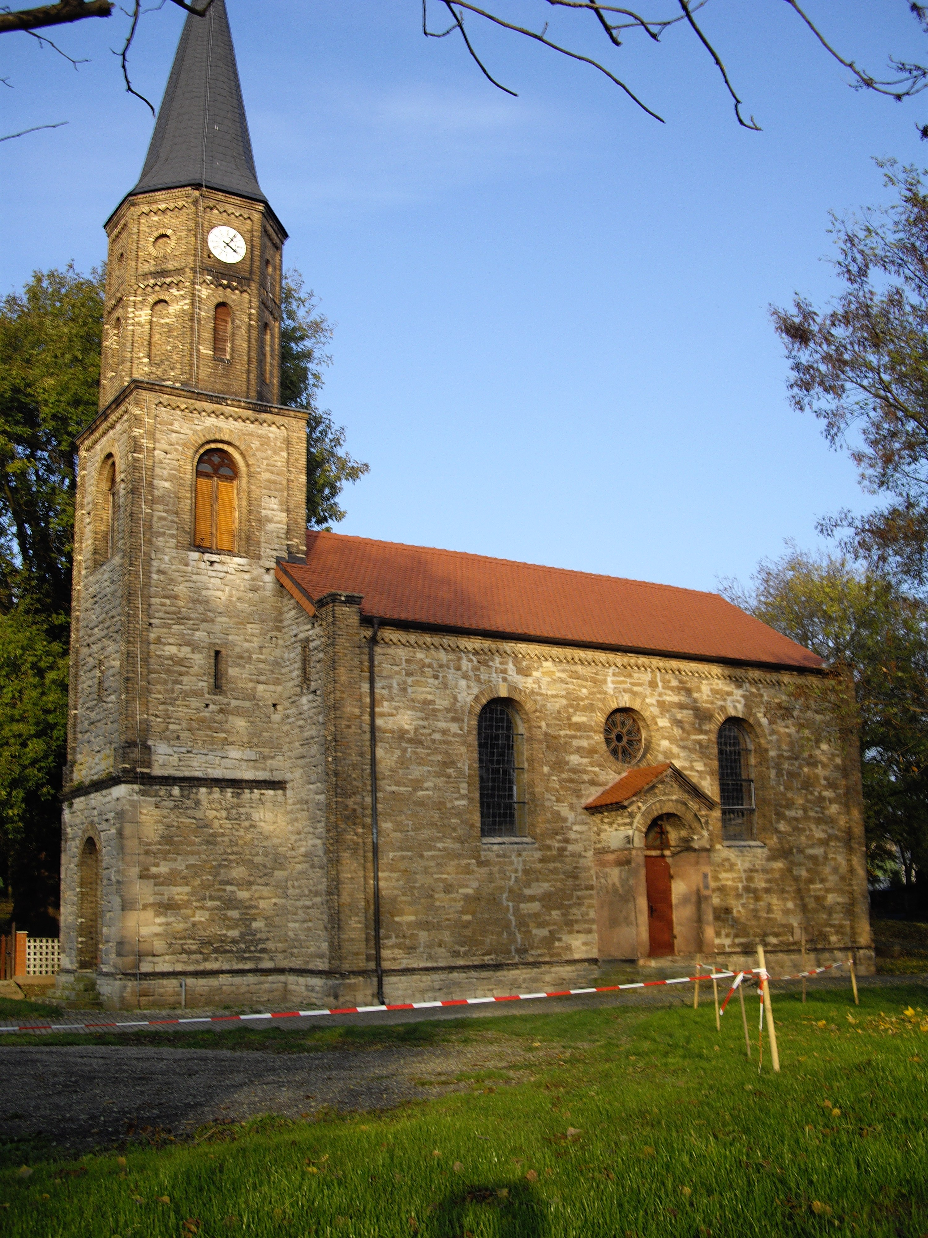 Die Kirche st.Moritz im Gerbstedter Ortsteil Adendorf